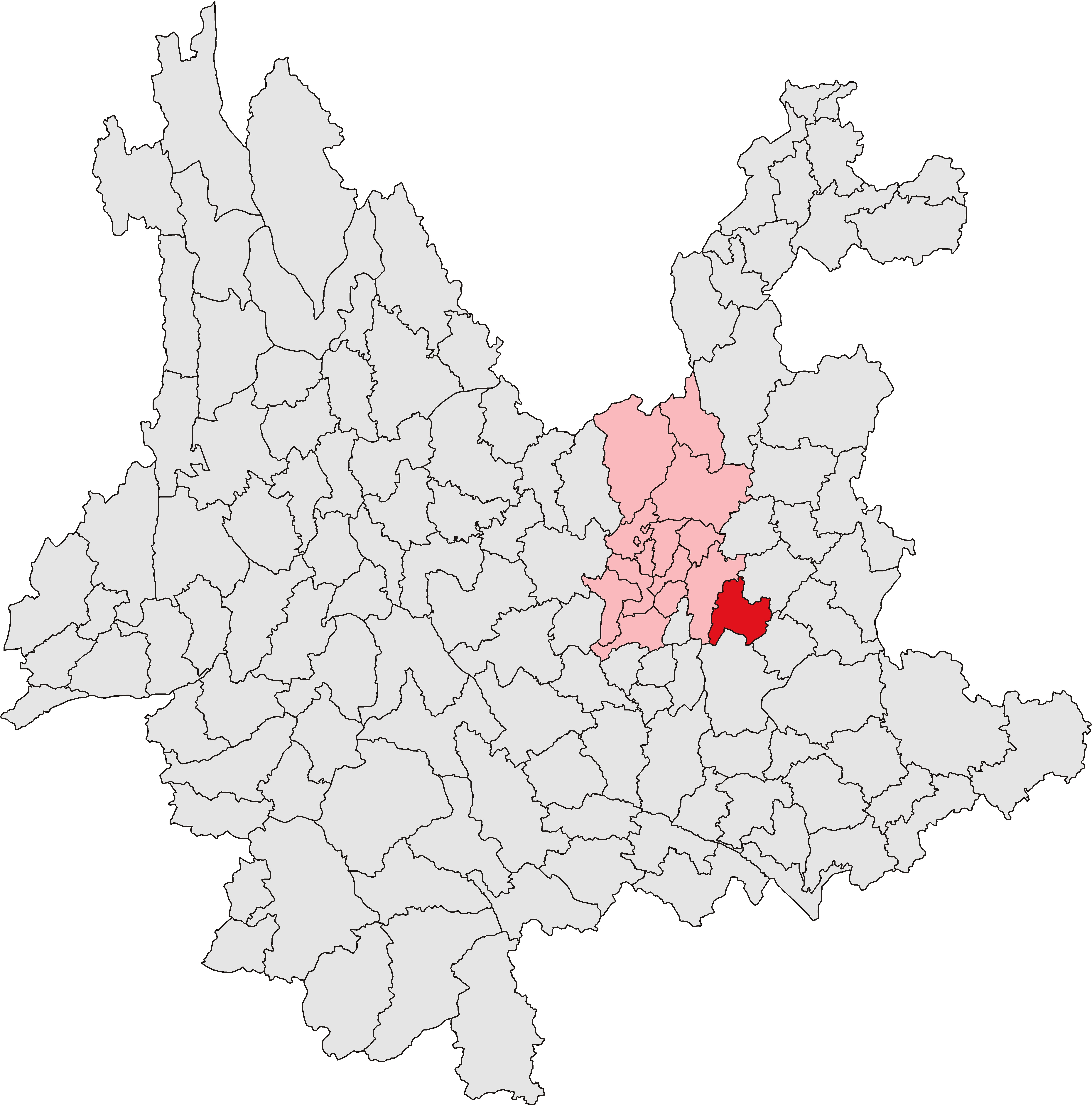 中文（中国大陆）: 石林彝族自治县位置图